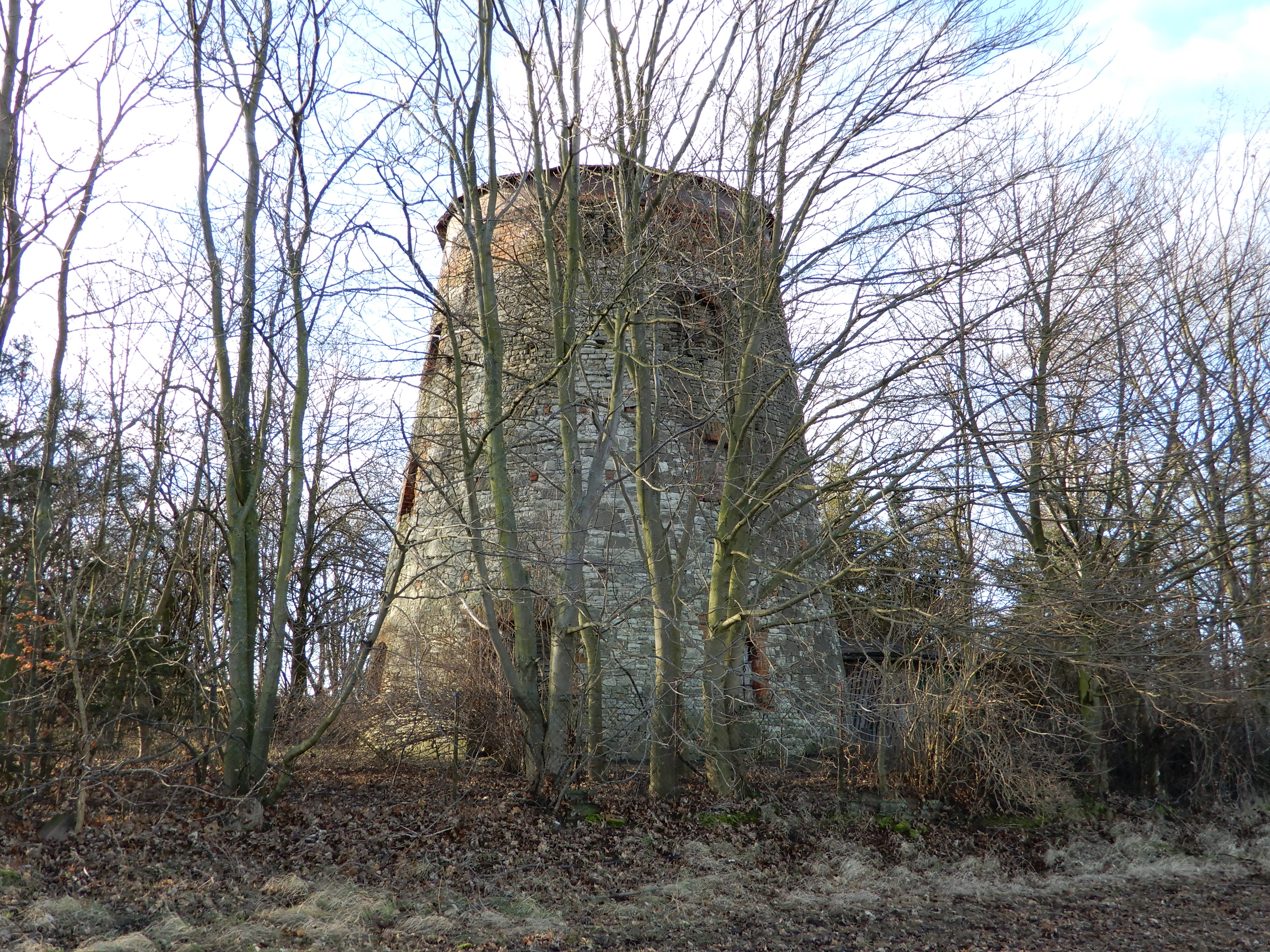 Turmholländer-Windmühle an der Straßenkreuzung Meisdorfer Straße/B185